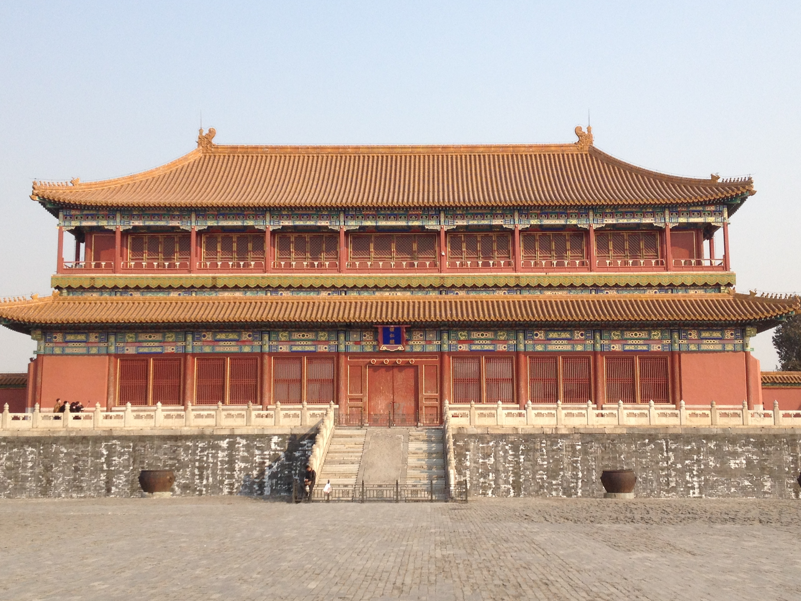 北京故宫中的体仁阁